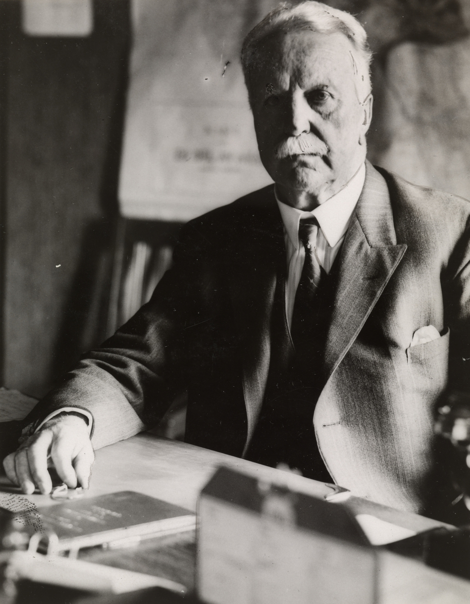 Arkitekten Johan Storm Munch. Ukjent fotograf, ca. 1930. Fra Byhistorisk samling hos Oslo Museum.